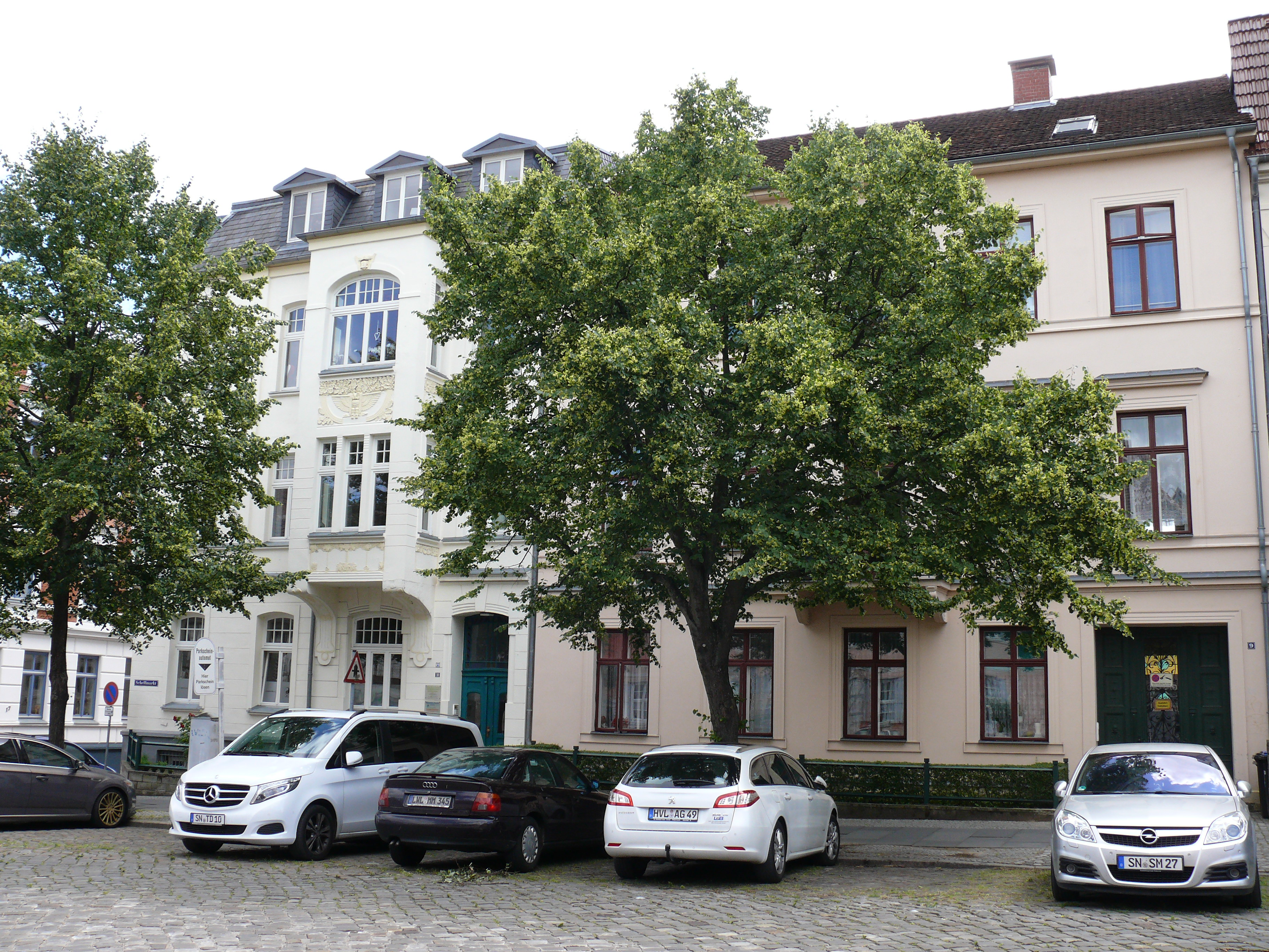 Die Gebäude "Schelfmarkt 9 (rechts) + 10 (links)" in Schwerin.